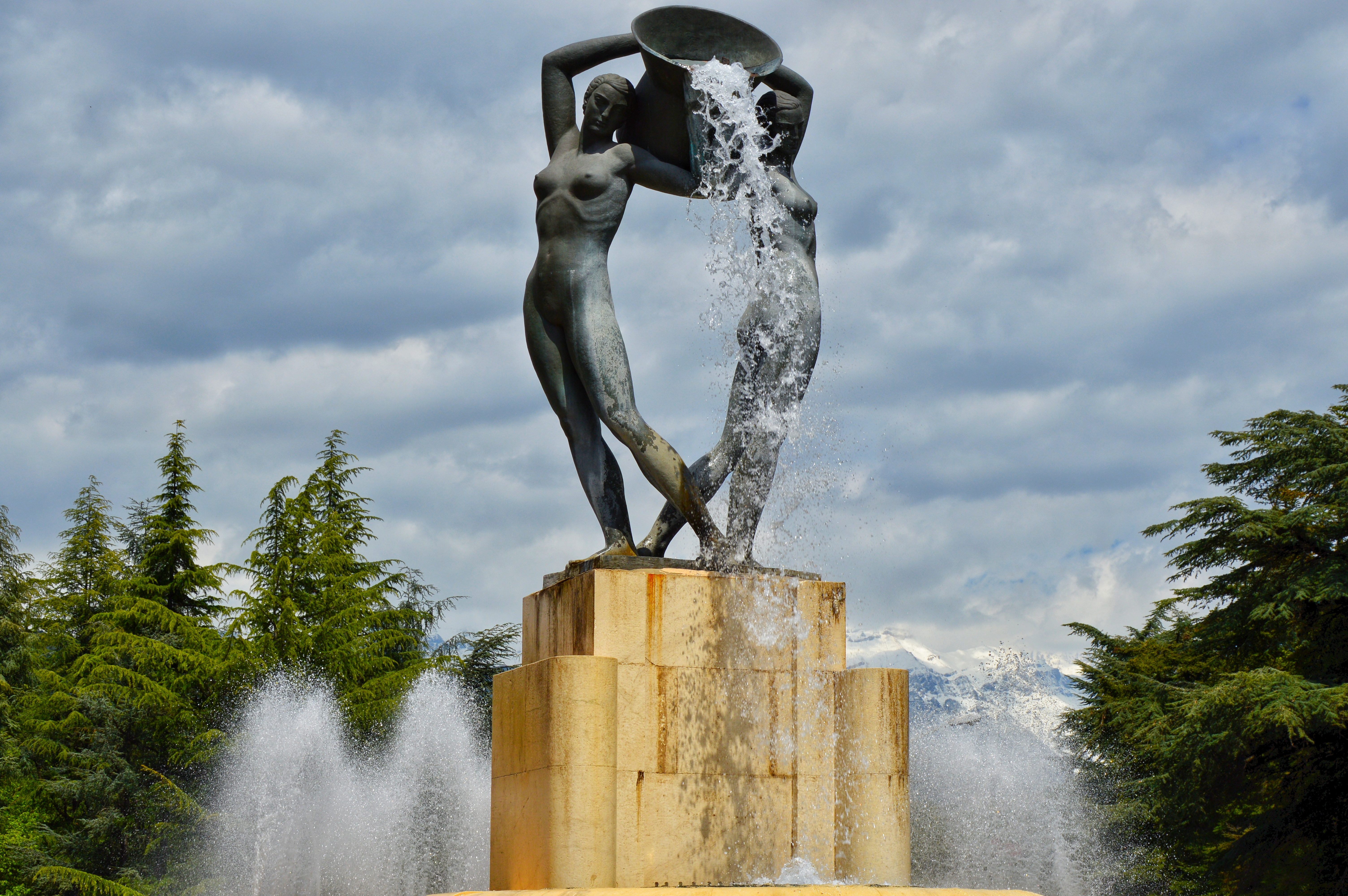 Fontana-Luminosa